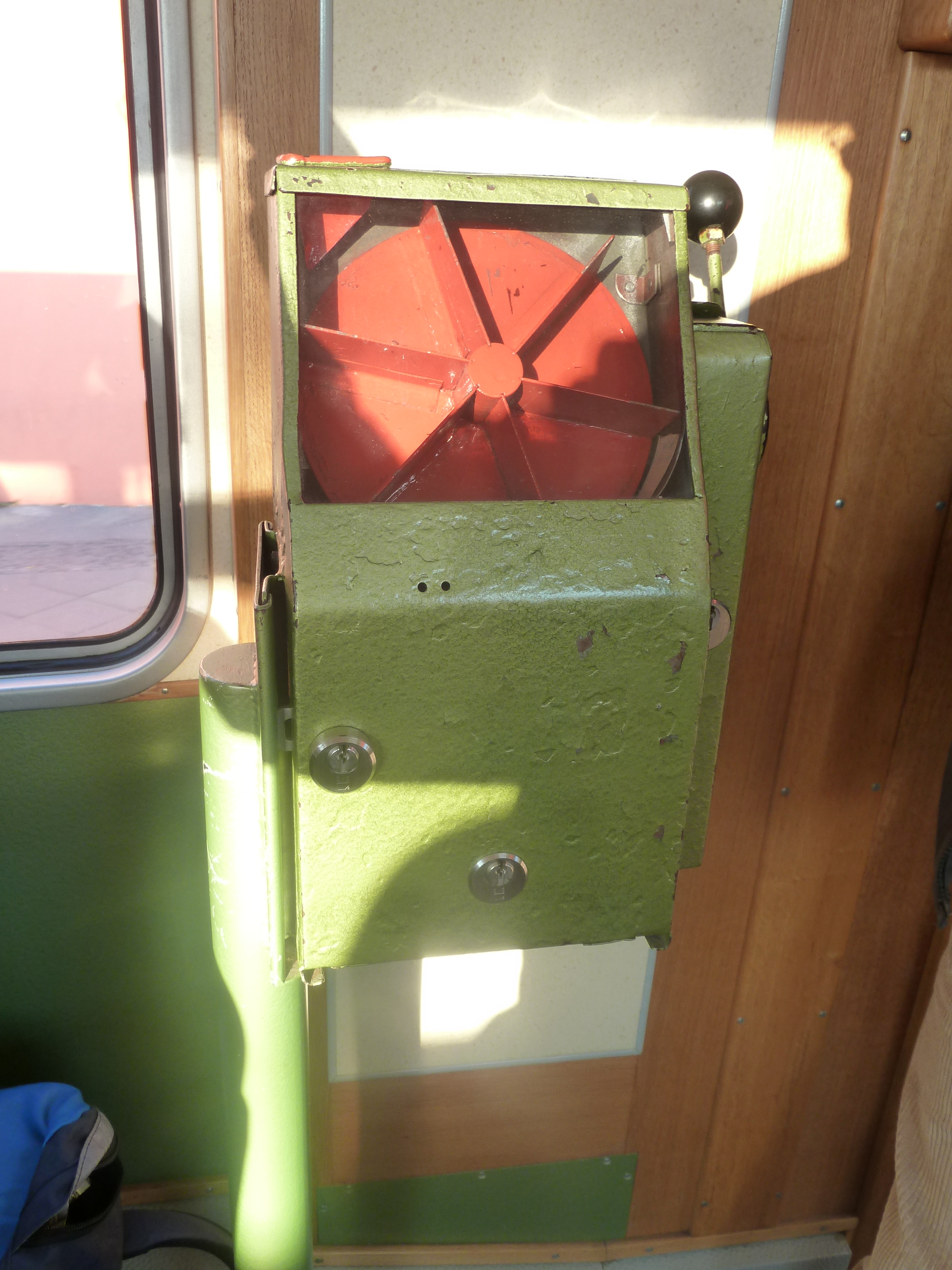 Zahlbox aus DDR-Zeiten(in hist. Straßenbahn des VIP Potsdam)